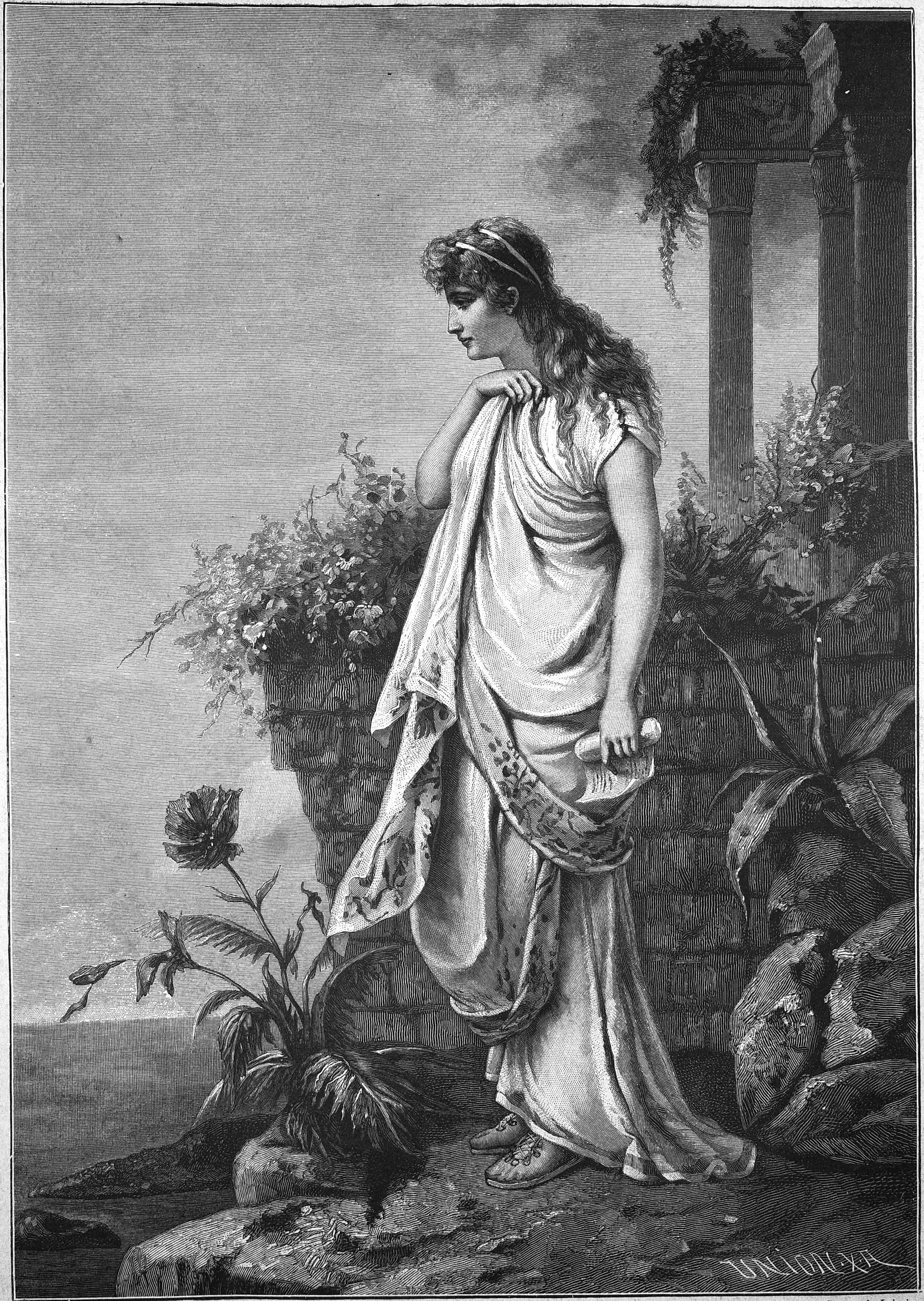 Sappho von Heva Coomans